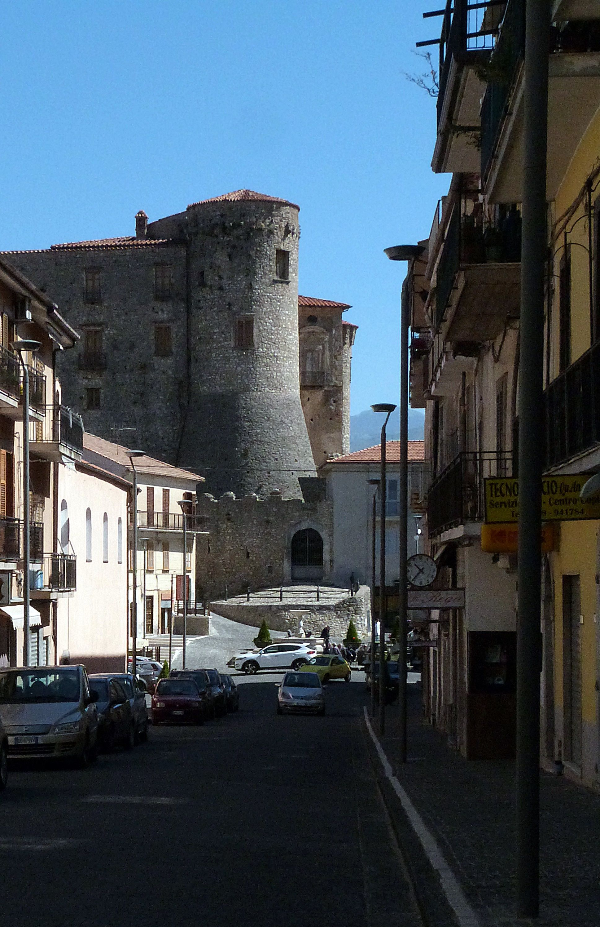 Roccadaspide: Castello feudale